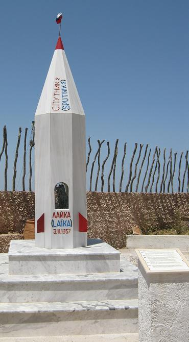 Памятник Лайке, первой собаке-космонавту, расположен на Крите (Греция) в музее Homo Sapiens. Координаты 35°12’55 "N, 25°27’38" E. Памятник выполнен в виде стилизованной ракеты из белого мрамора, стоящей на стартовом столе, внутри ракеты в проеме скульптура собаки - Лайка.